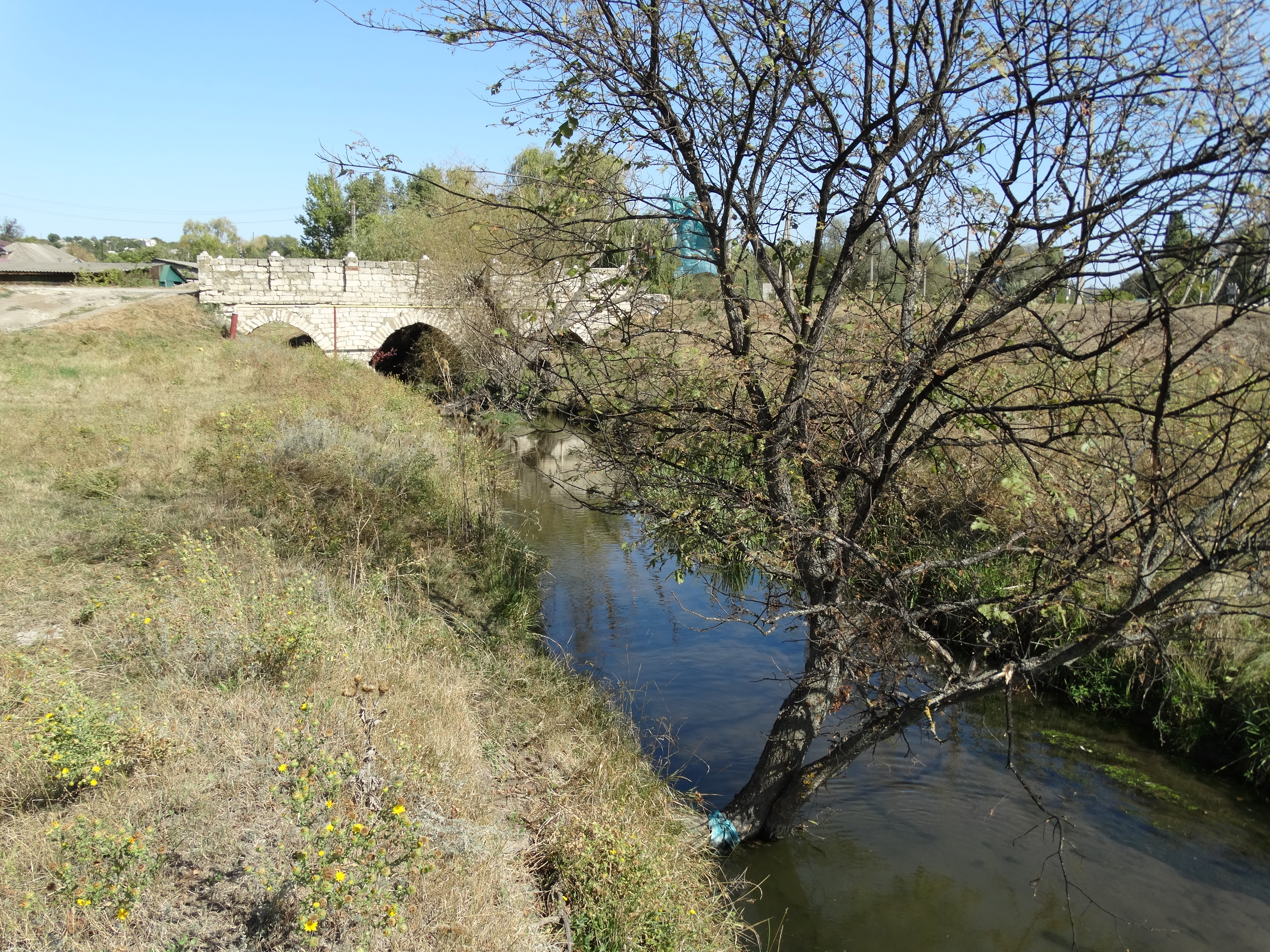 Річка Ягорлик в смт Окни, Одеська область. Вікіекспедиція на північ Одещини